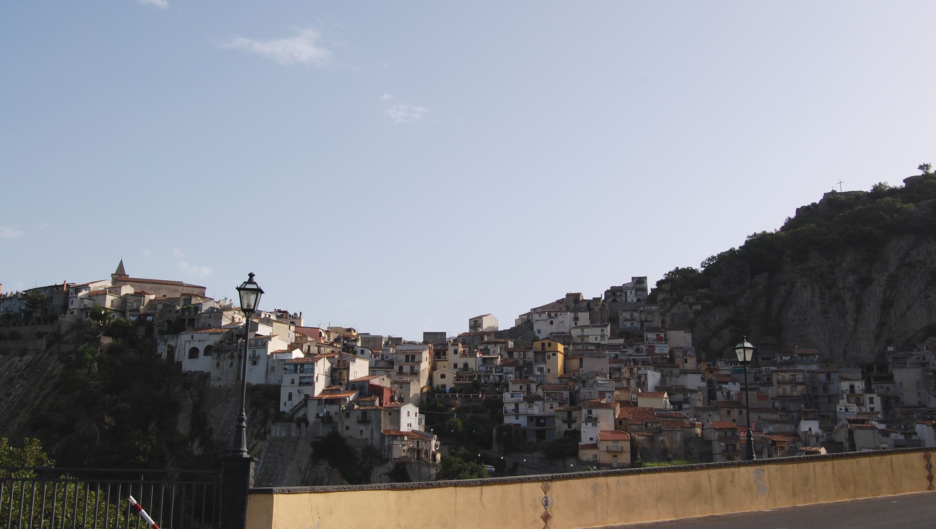 Il comune di Motta Camastra, provincia di Messina, Sicilia.